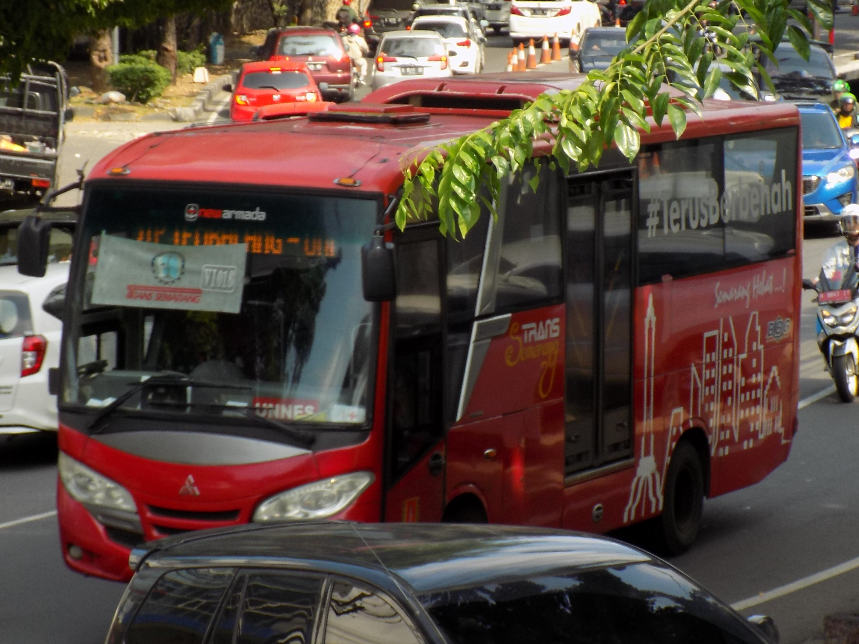 Koridor 6 - New Coaster Trans Semarang Operated by PT Cakra Mega Transport